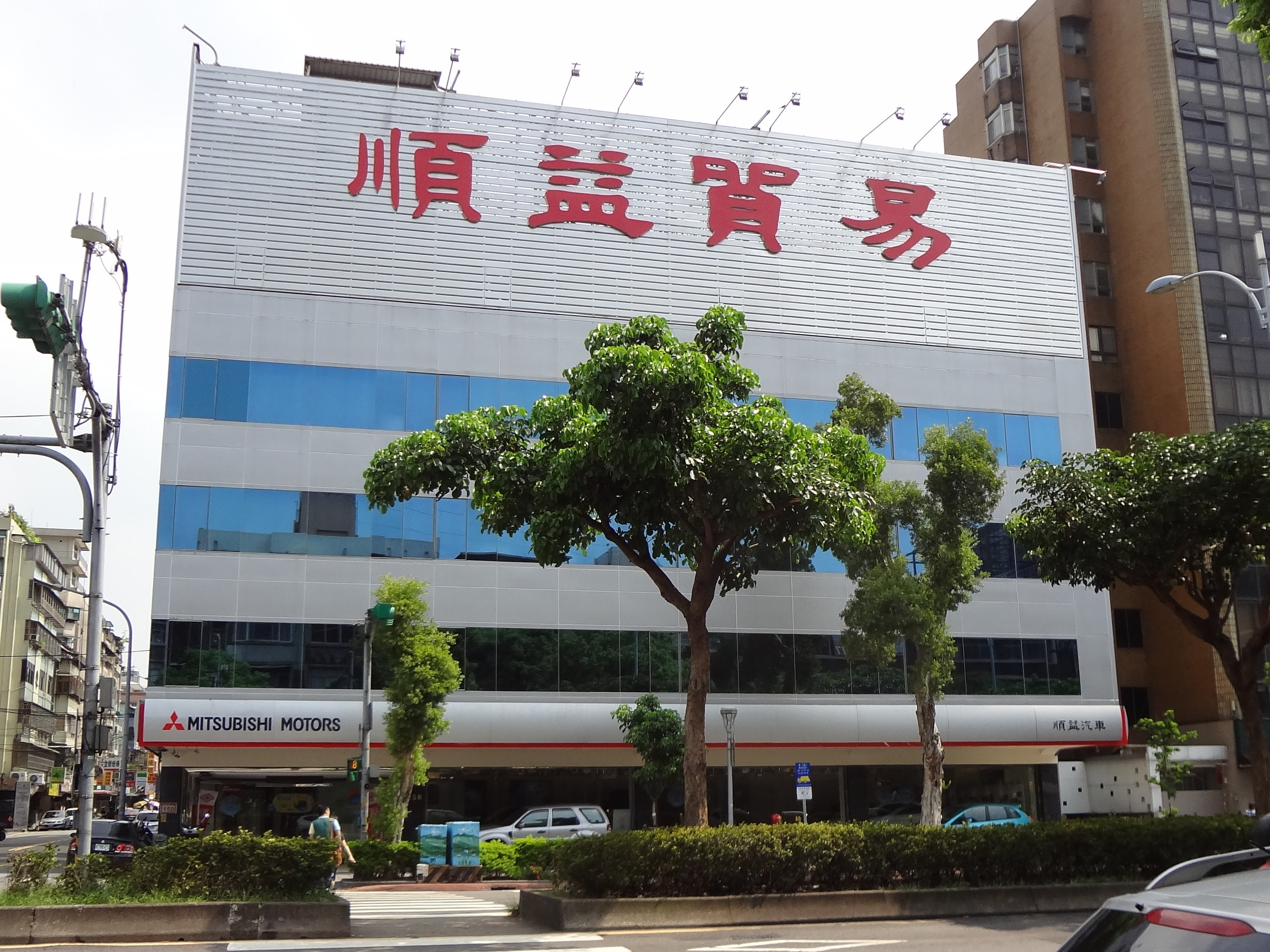 順益貿易總部，位於臺北市中山區民權東路二段150號。